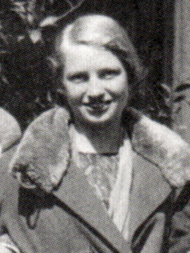 Gudrun Mörne utanför dansrestaurang Opris sommaren 1928.